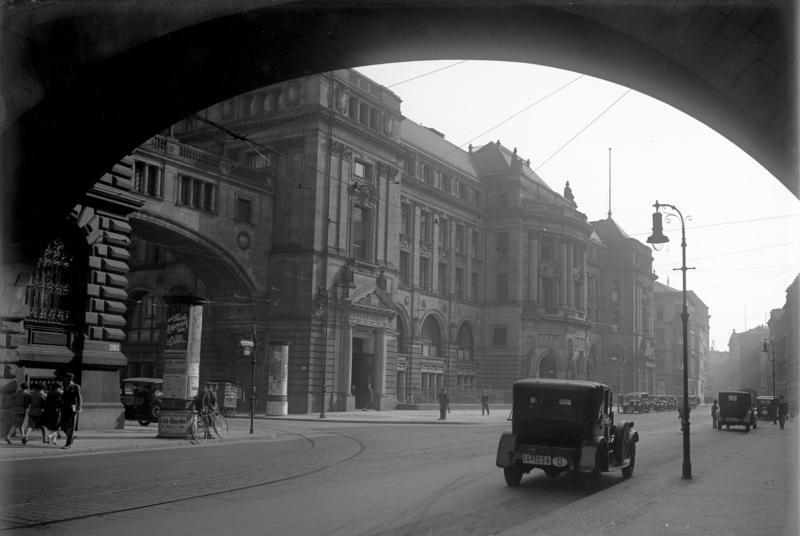 Bank-Fusion Deutschlands grösster Banken! Blick auf das Direktions-Gebäude der Deutschen Bank in der Mauerstrasse in Berlin.